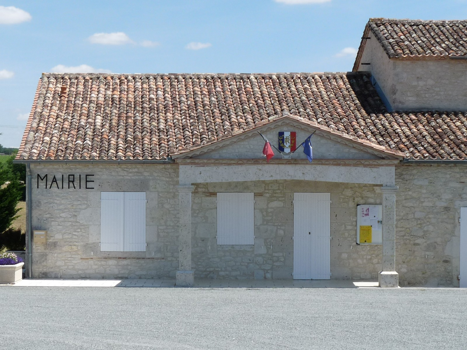 Mairie de Saint-Astier, Lot-et-Garonne, France